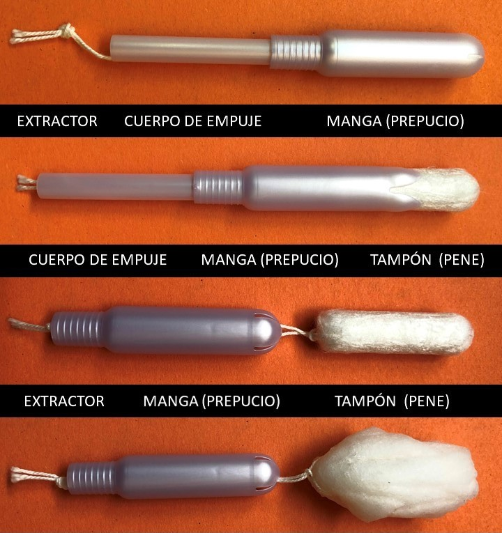 Principios de la biomecánica del prepucio en la función cotal aplicada en tampon para higiene menstrual, para poder introducir un bástago de algodón